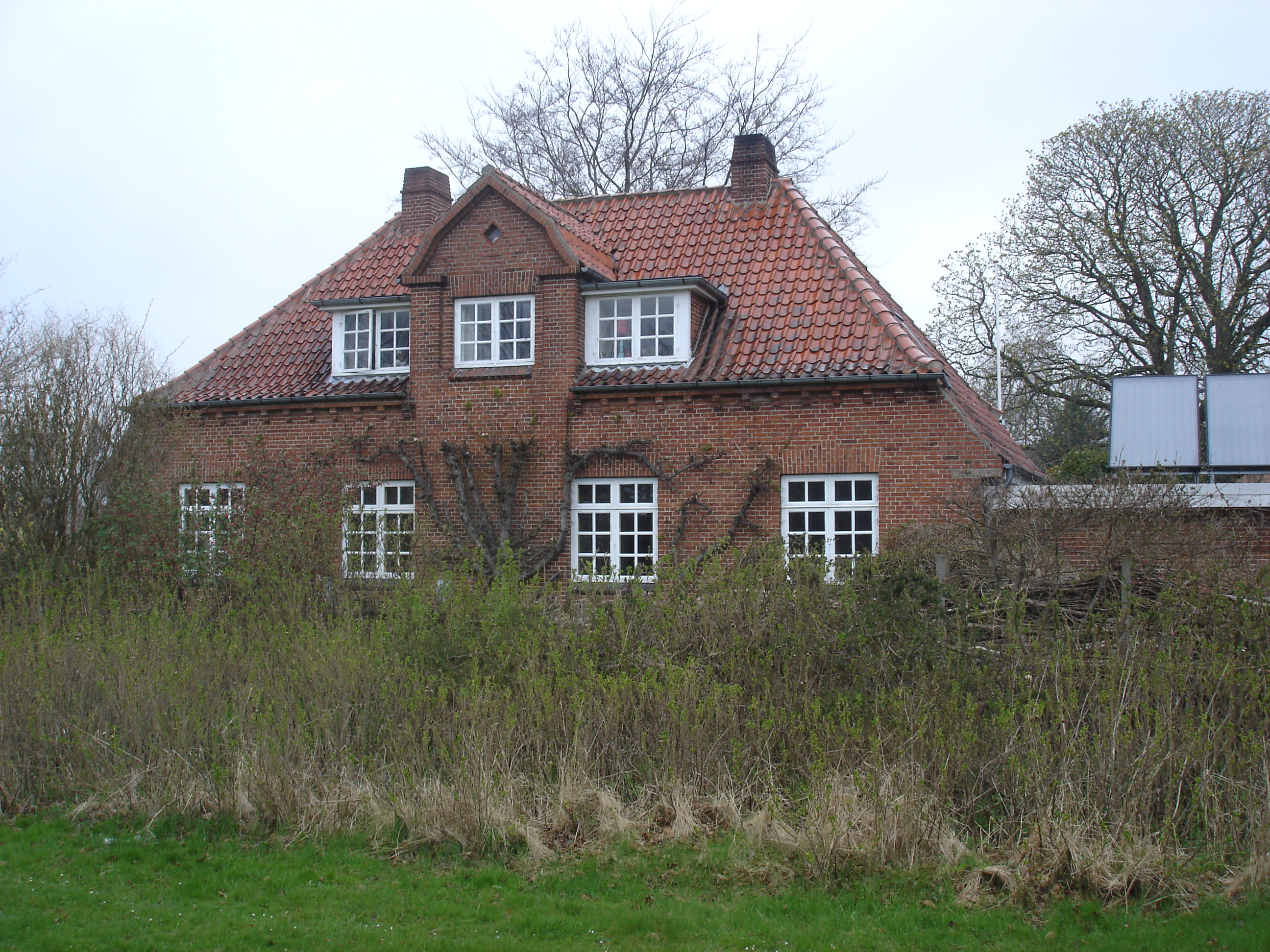 Ulbølle Station fra sporsiden